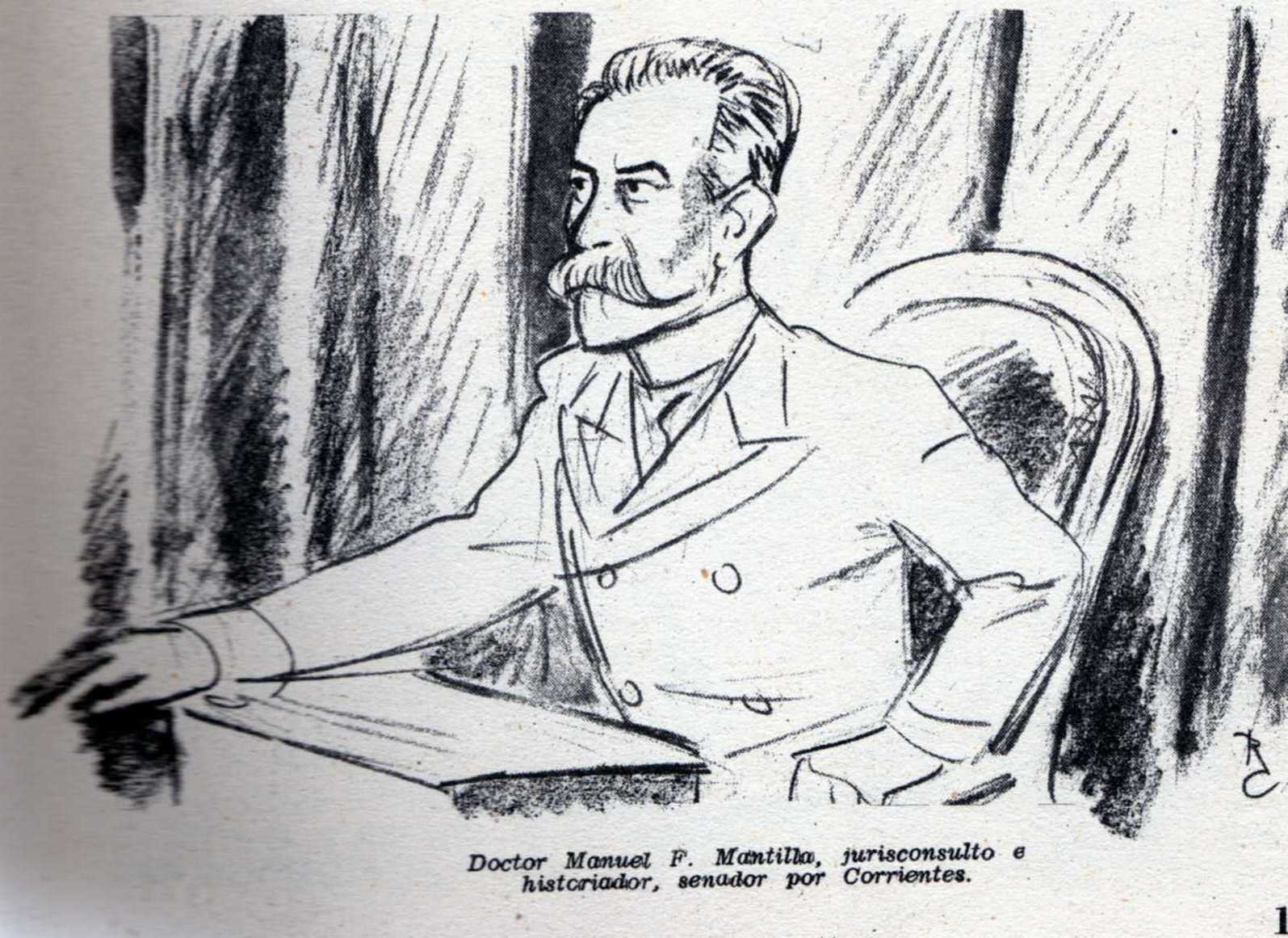 Manuel Florencia Mantilla en la Revista Caras y Caretas.